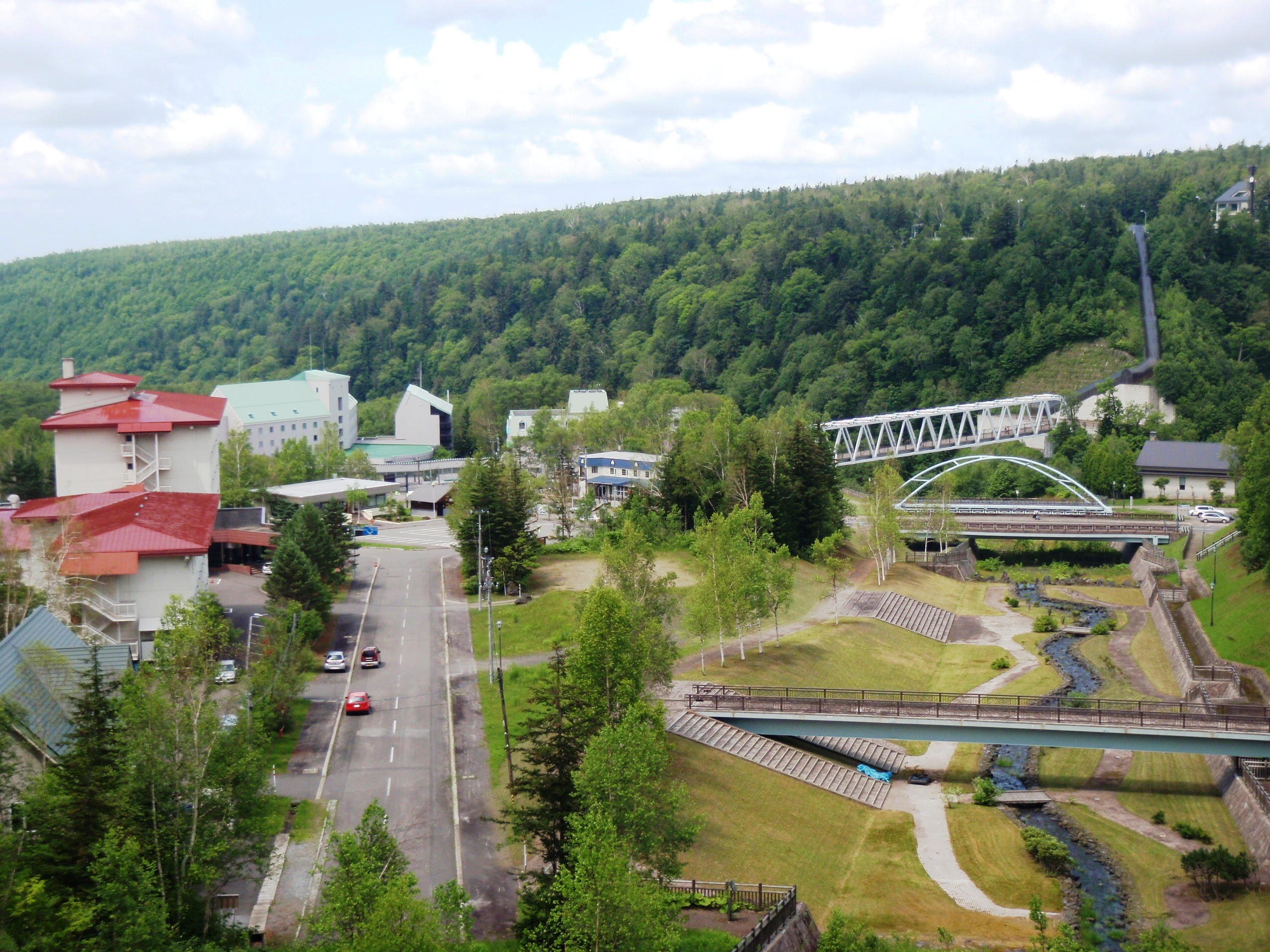 美瑛町、白金温泉街。新月橋上から撮影。